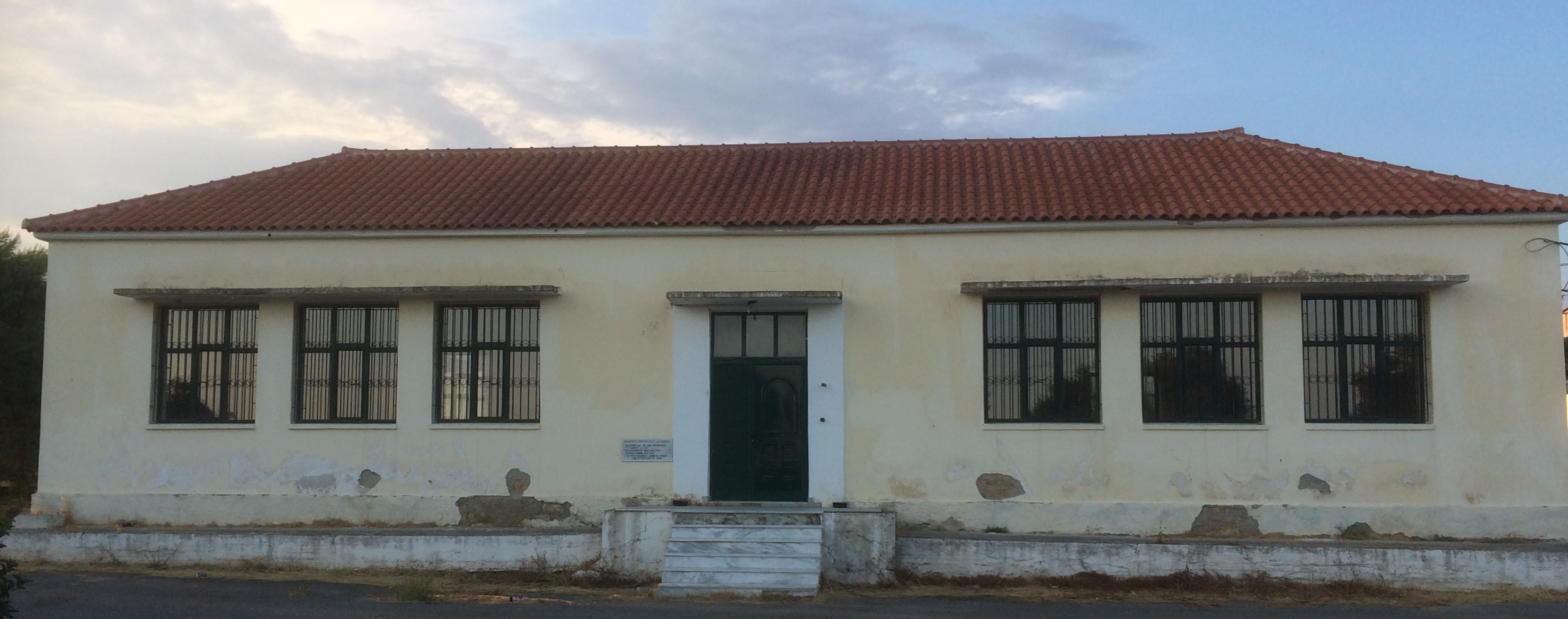 Πρώην Δημοτικό Σχολείο (Αστέρι, Λακωνίας)